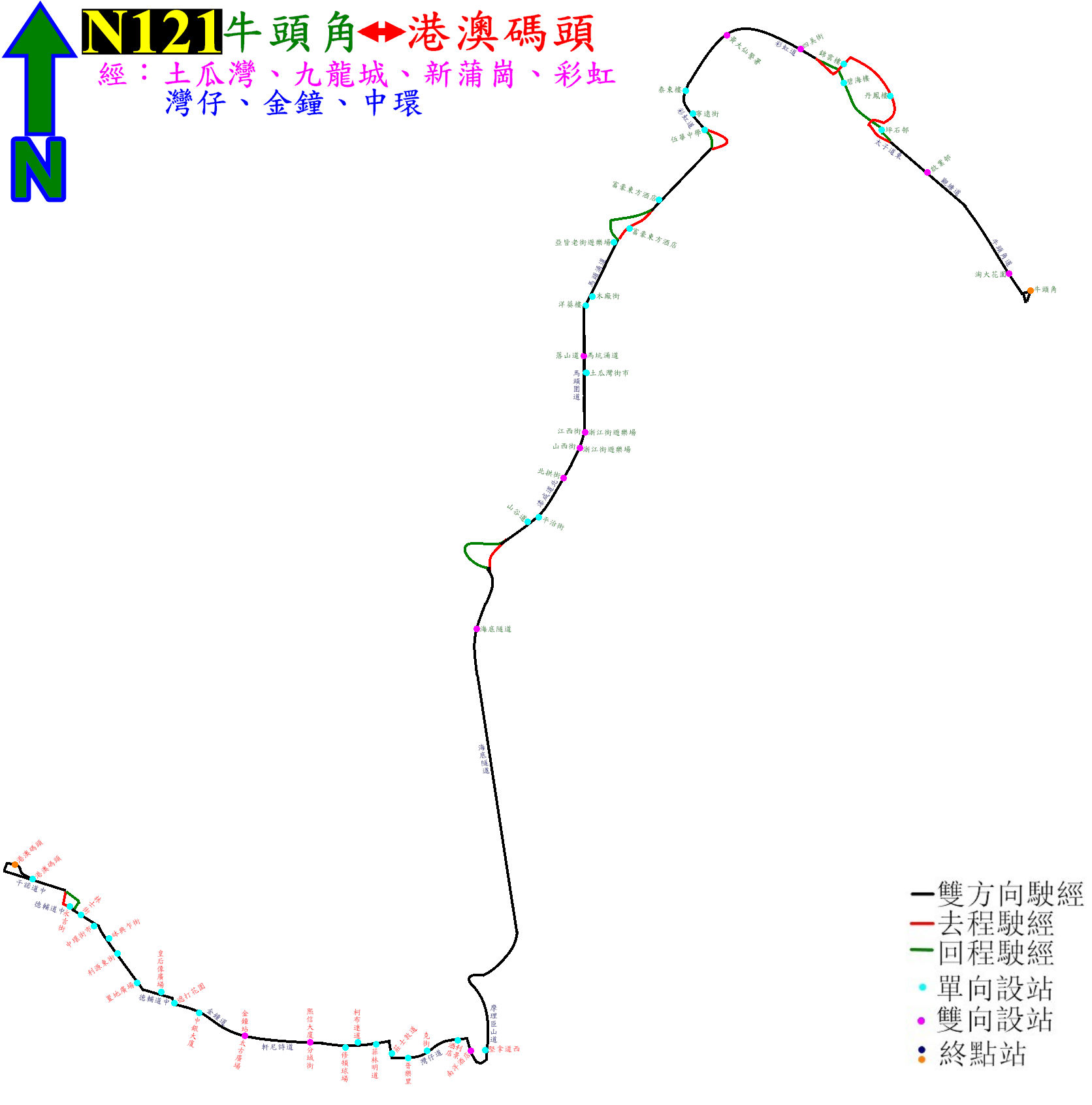 中文（香港）: 過海隧巴N121線的走線圖